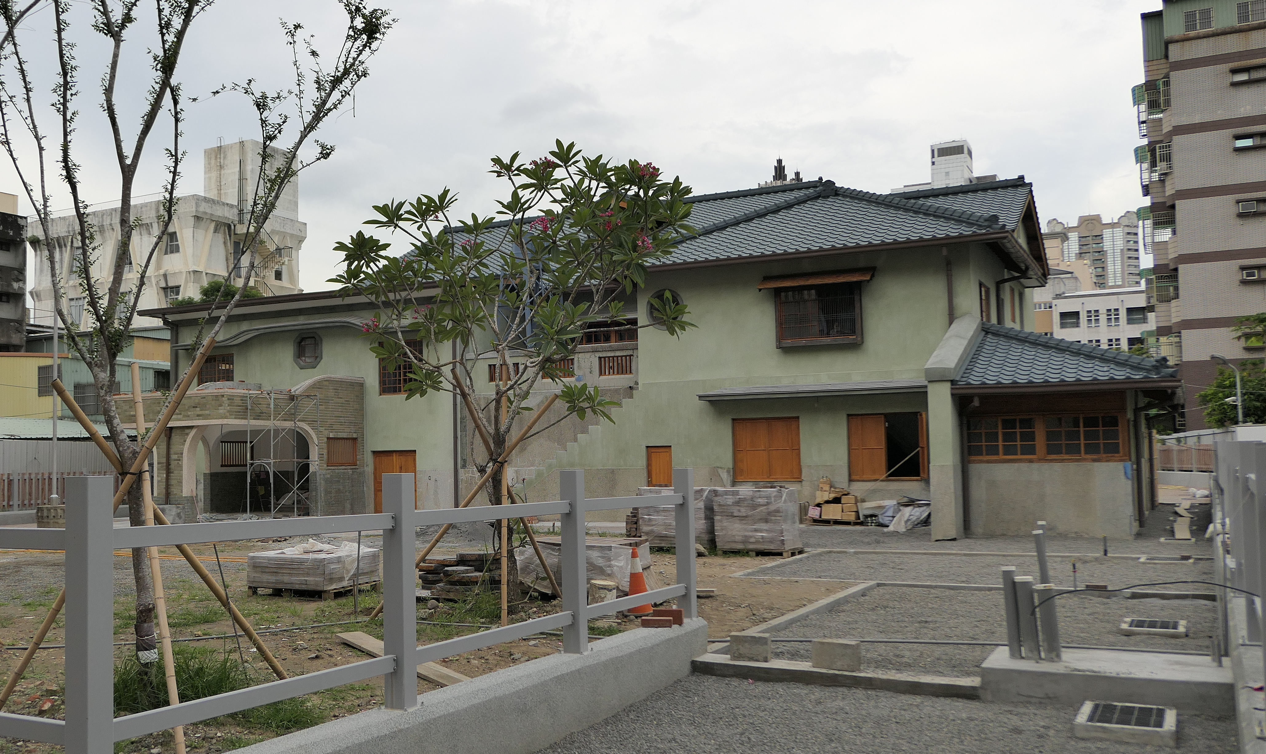 中文（台灣）: 2020年的逍遙園